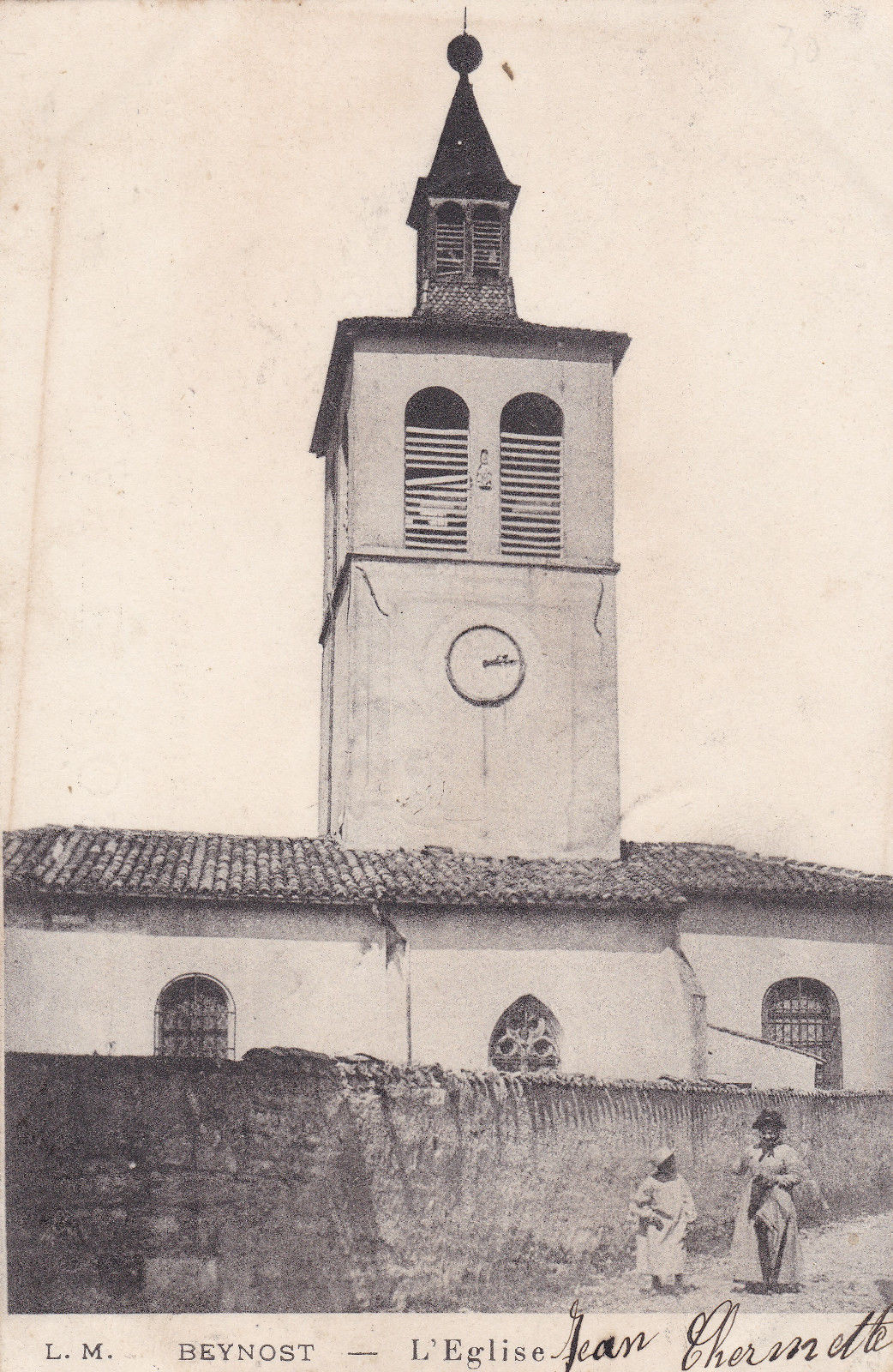 Clocher de la première église Saint-Julien de Beynost (carte postale ancienne, 1904)